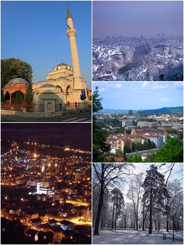 Panorama Banja Luke